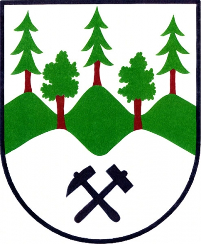 znak, Strážné, okres Trutnov